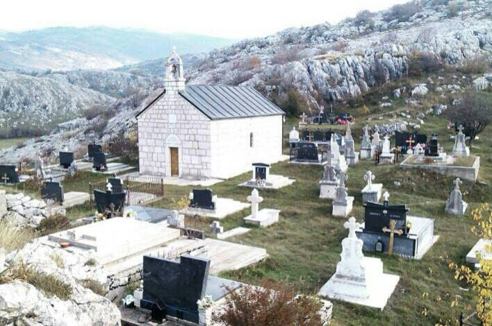 Crkva Sv. Arhandjela Mihaila